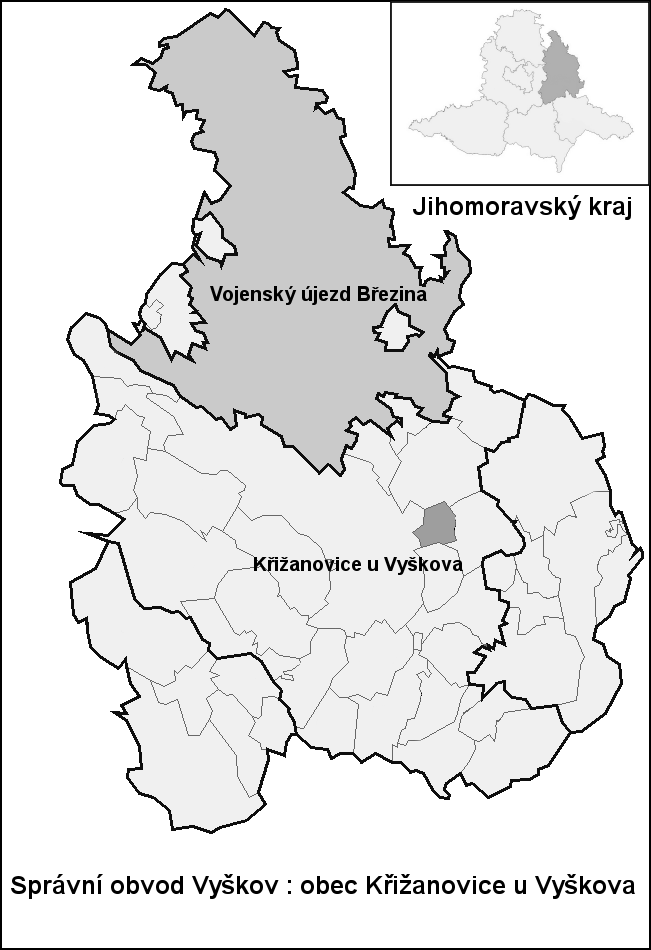 Hranice Křižanovice_u_Vyškova (Vyškov- Czech republic)